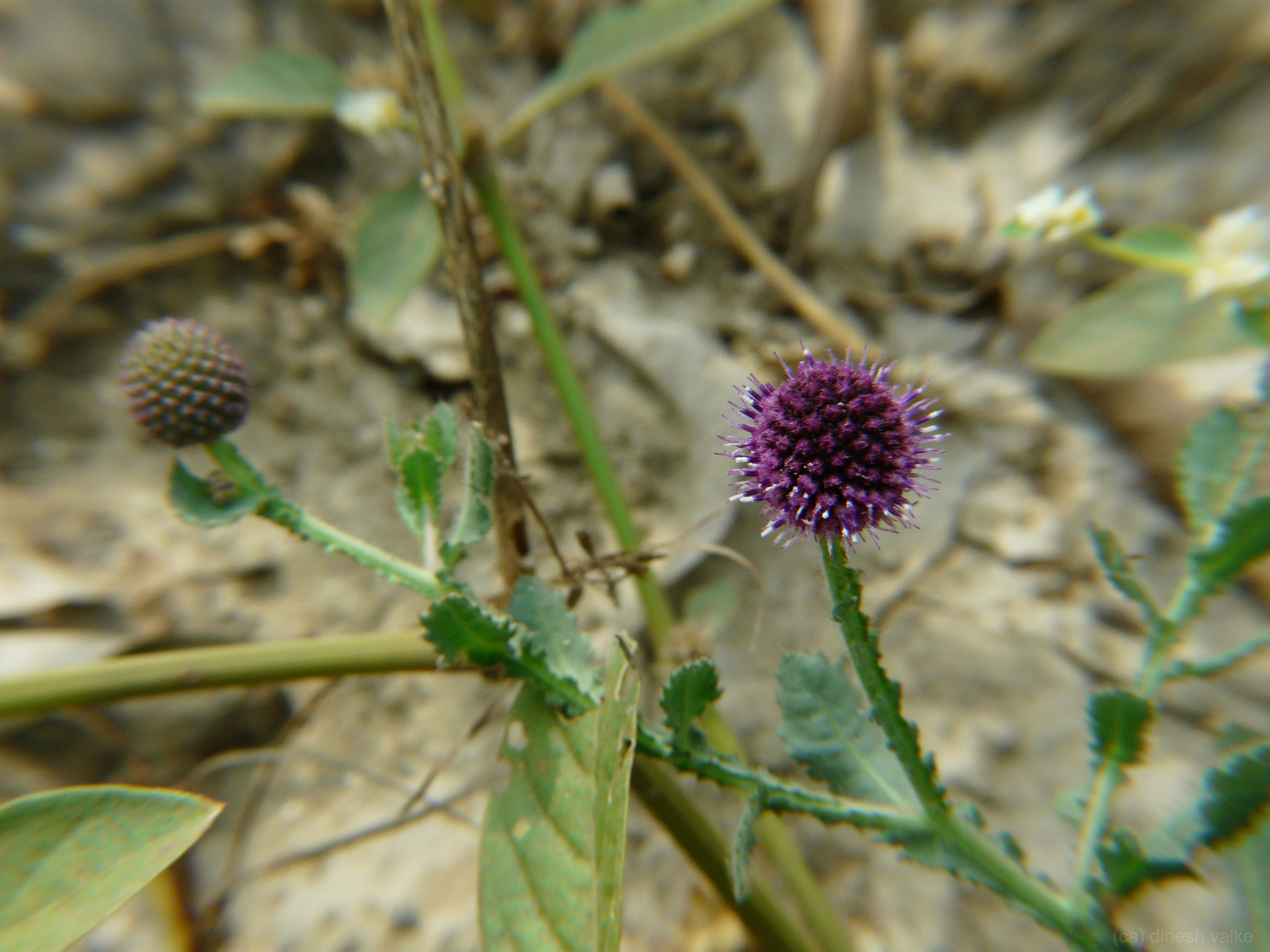 Asteraceae (aster, daisy, or sunflower family) » Sphaeranthus indicus sfay-RAN-thus -- from the Greek words sphaira (sphere) and anthos (flower) IN-dih-kus or in-DEE-kus -- of or from India commonly known as: East Indian globe thistle, Indian sphaeranthus, seed basil • Arabic: kamaz ariyus • Bengali: মুরমুরিযা murmuriya • Gujarati: ગોરકમુન્ડી gorakhmundi • Hindi मुण्डी mundi • Kannada: ಬೋಡು ಕಡಲೆ bodu-kadale • Konkani: गोरखमुण्डी gorakhmundi • Malayalam: മിരംഗനീ mirangani • Marathi: खडकशेपू khadakshepu, मुंडी mundi, नाई nai, नाय naya • Nepalese: गोरखमुन्दि gorakhmundi • Oriya: buikadam • Sanskrit: मुण्डि mundi • Santal: belaunja • Tamil: கொட்டைக்கரந்தை kottai-k-karantai, உதறிமுறிப்பான் utharrimurrippan, விஷ்ணுகரந்தை visnu-karantai • Telugu: బోడతరము boda-taramu, శ్రావణి sravani • Urdu: منڐي گل gul mundi • Undari: mundi Native to: India, Nepal, Sri Lanka, Myanmar, tropical Australia; naturalized elsewhere References: Indian Globe Thistle.html Flowers of India • GRIN • Ayurvedic Medicinal Plants